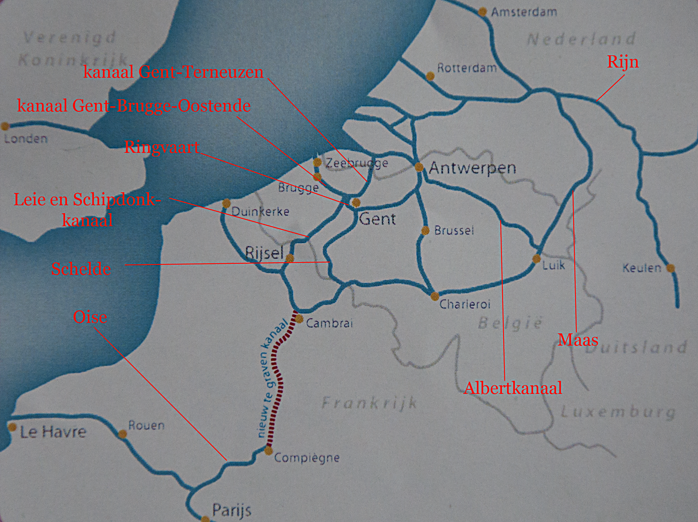 Het project Seine - Noord-Europa, verbinding via waterwegen tussen Frankrijk, België, Nederland en Duitsland, kaart gemaakt door Waterwegen en Zeekanaal nv, aangepast door de oplader van de foto